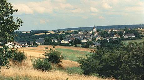 Ortsansicht Dörscheid, von der Schwedenschanze aus gesehen